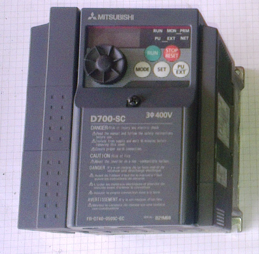 Frekvenčni pretvornik Mitsubishi tipa D700.